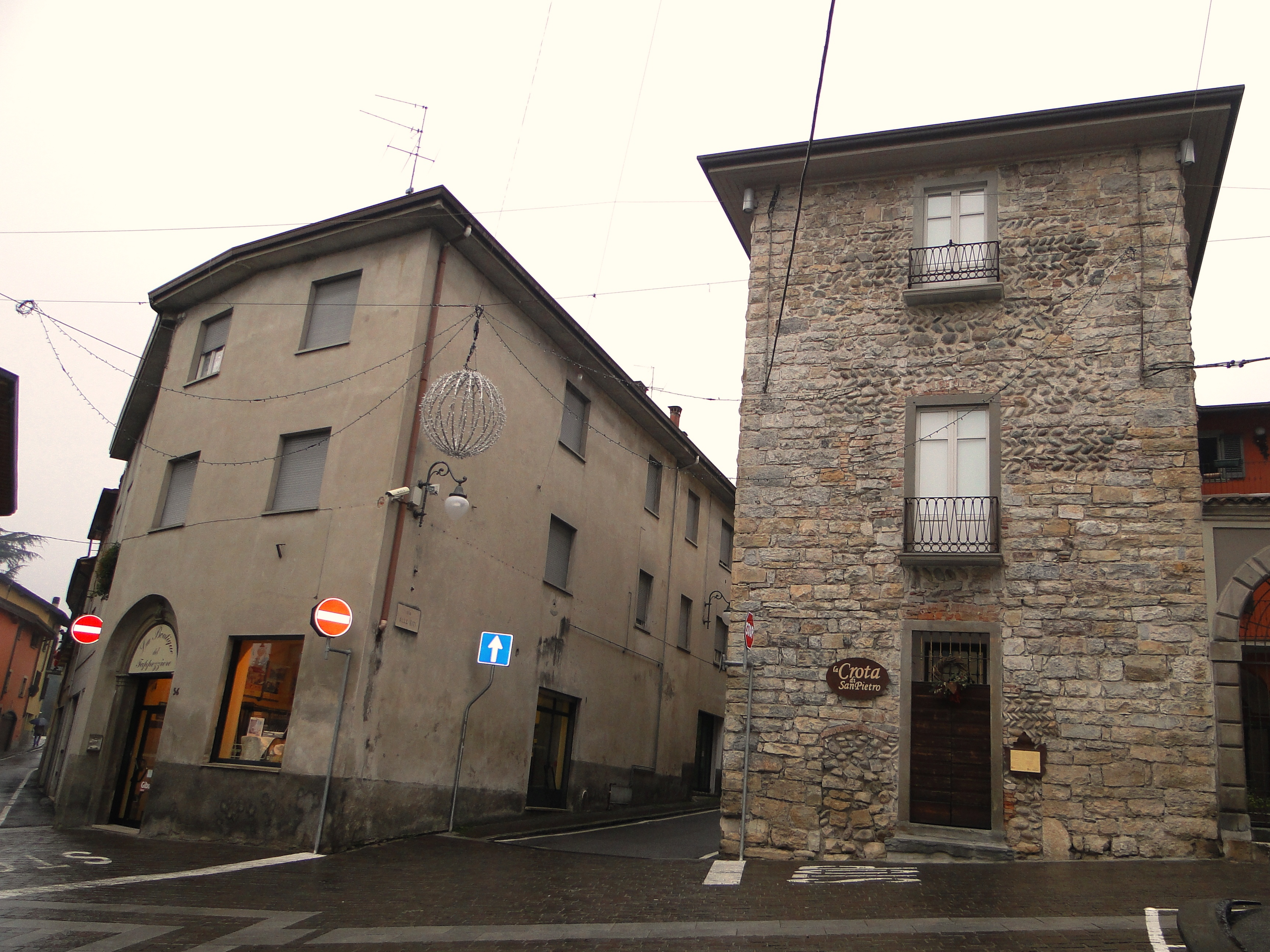 Alzano Lombardo (BG). Le torri poste all'ingresso del paese in età medievale (XIV secolo) nella zona dell'attuale via San Pietro